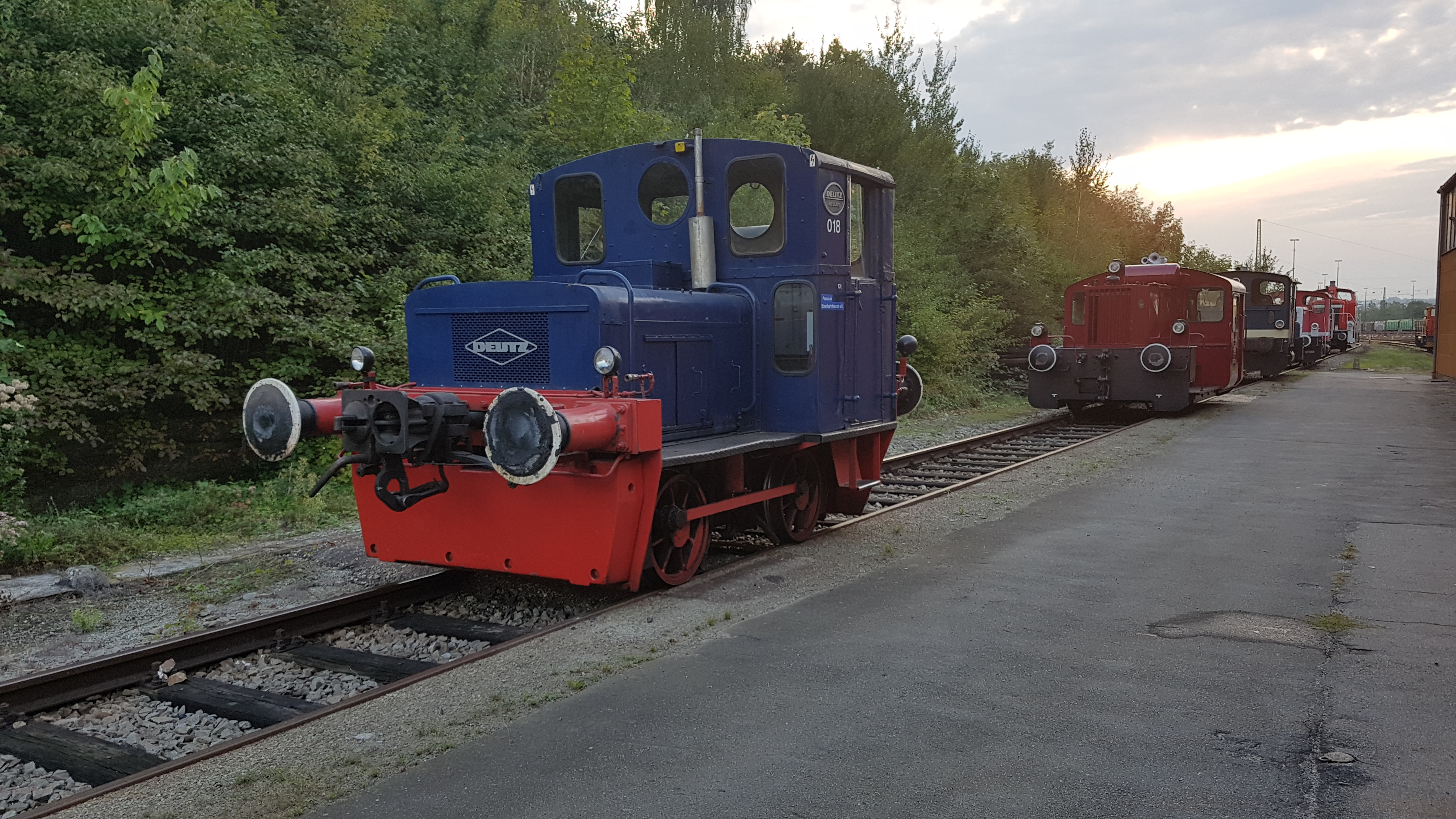 Stangenrangierlok "Auerhahn" der Passauer Eisenbahnfreunde auf dem vereinseigenen Gelände